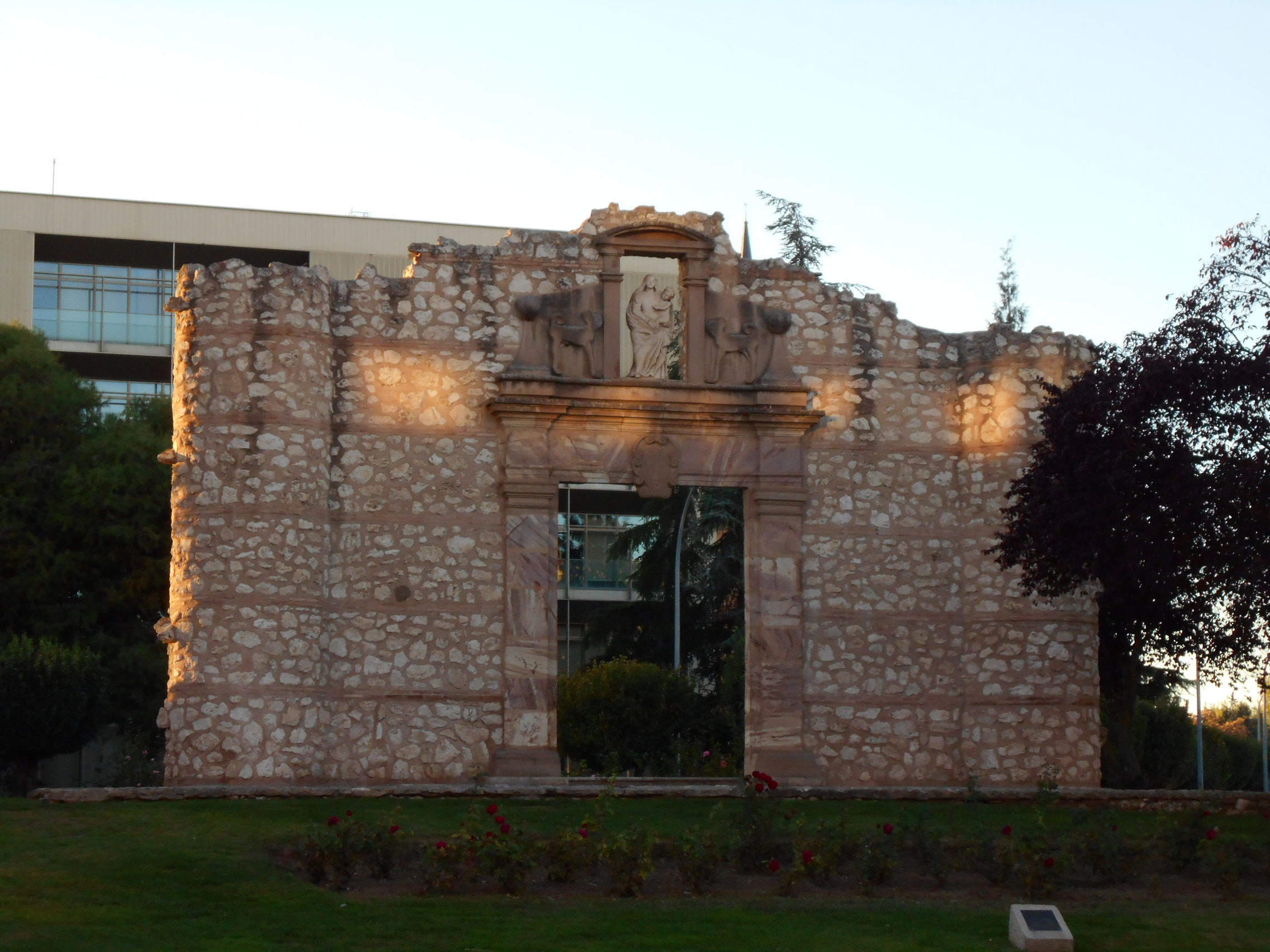 Monumento religioso